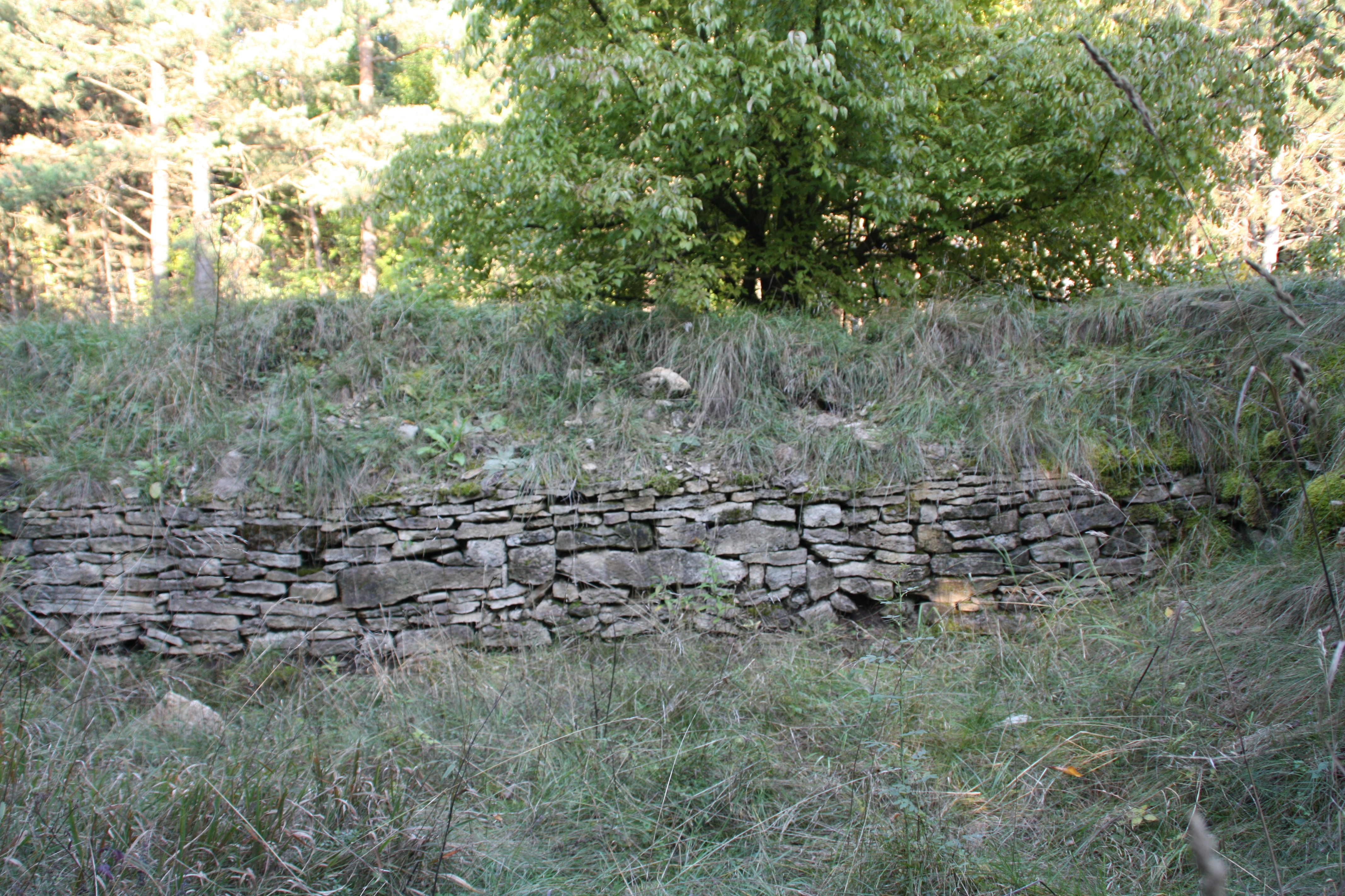 Jena-Lobeda, Johannisberg. Blick von Westen auf die teils wiedererrichtete innere Blendmauer der frühmittelalterlichen Befestigung.